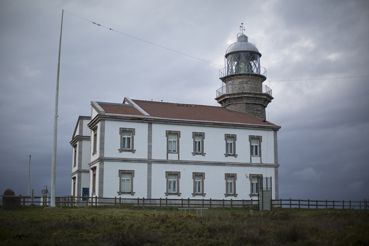 El Faro de cabo Peñas en Asturias